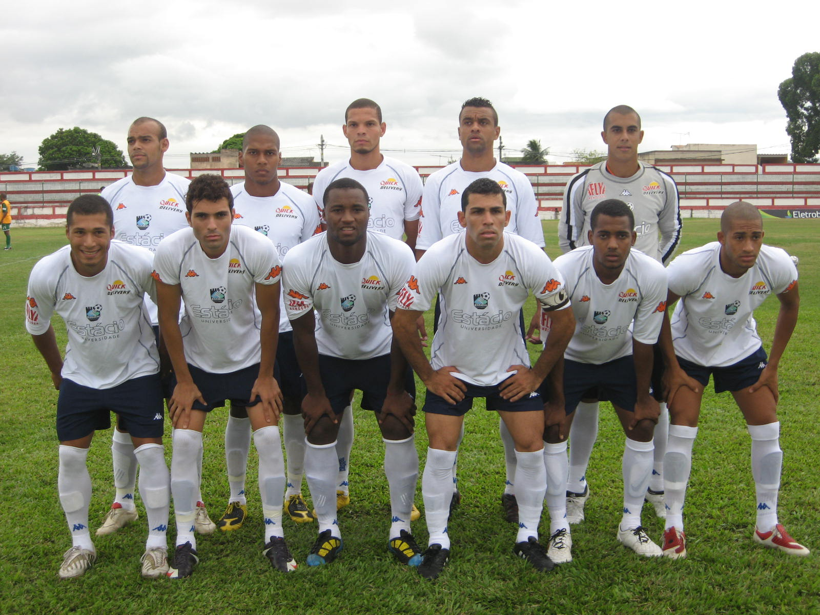 Equipe profissional da Estácio de Sá FC em 2011.